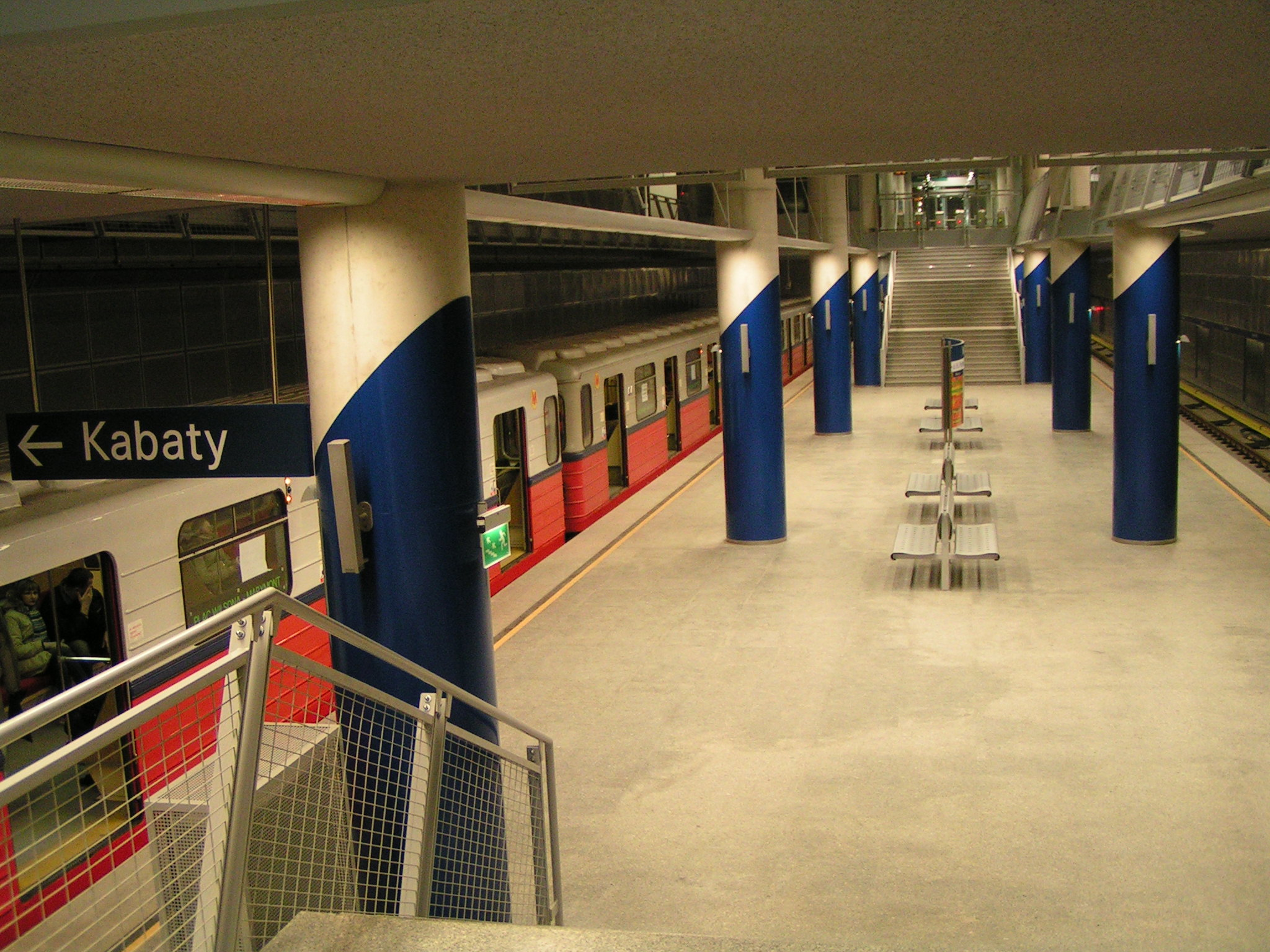 Stacja Marymont